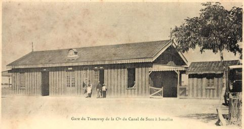 Ismailia, gare du tramway de la Cie du Canal de Suez